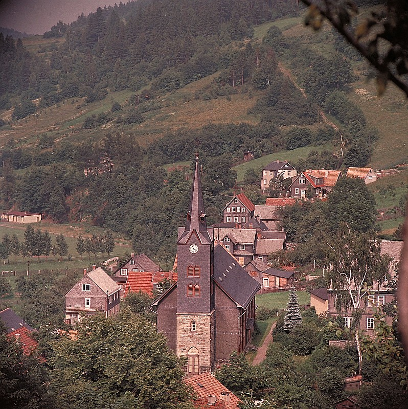 Ansicht von Mellenbach, eines Ortsteils von Mellenbach-Glasbach im Landkreis Saalfeld-Rudolstadt in Thüringen, im Vordergrund die Katharinenkirche